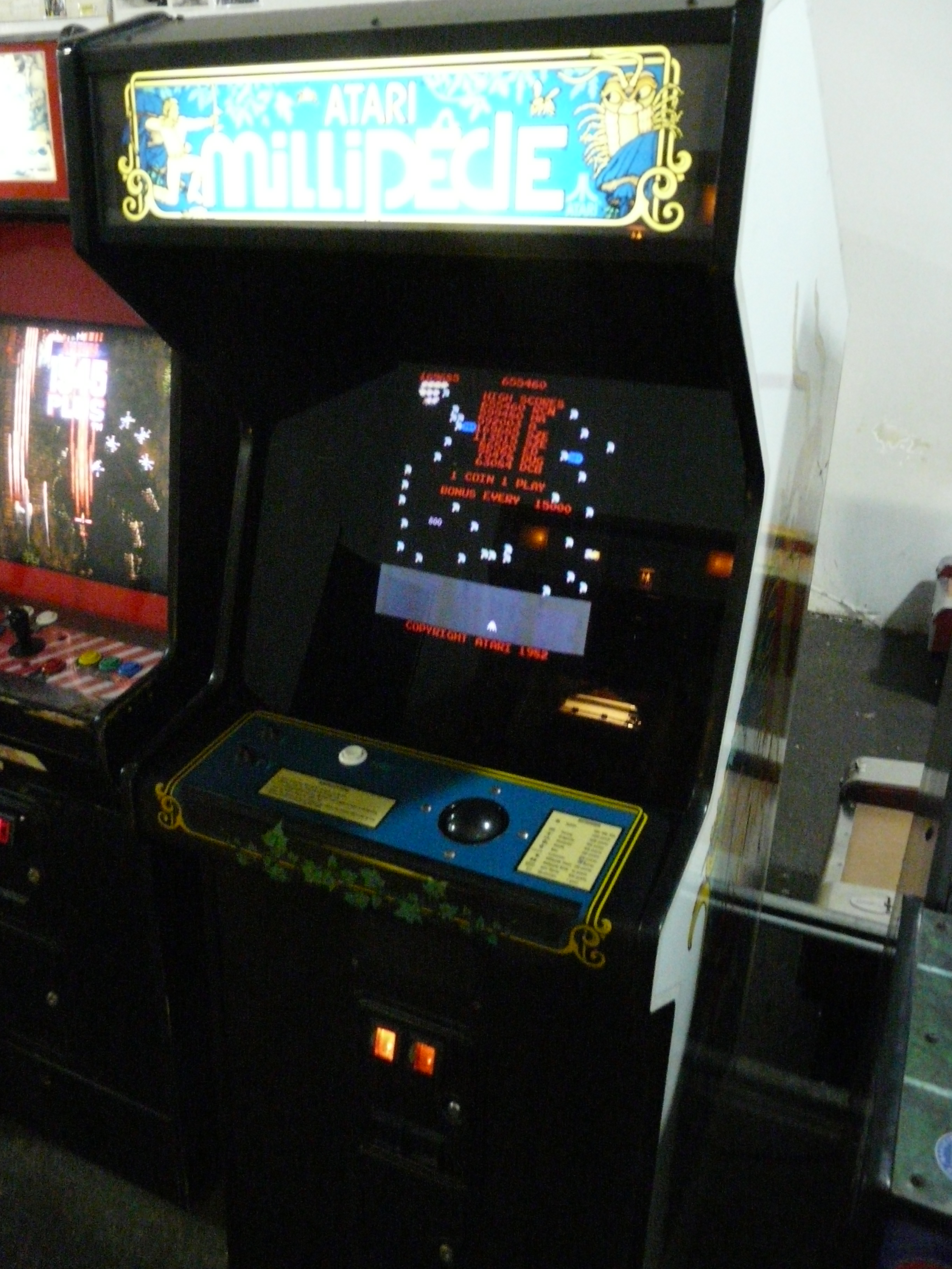 Millipede arcade game.